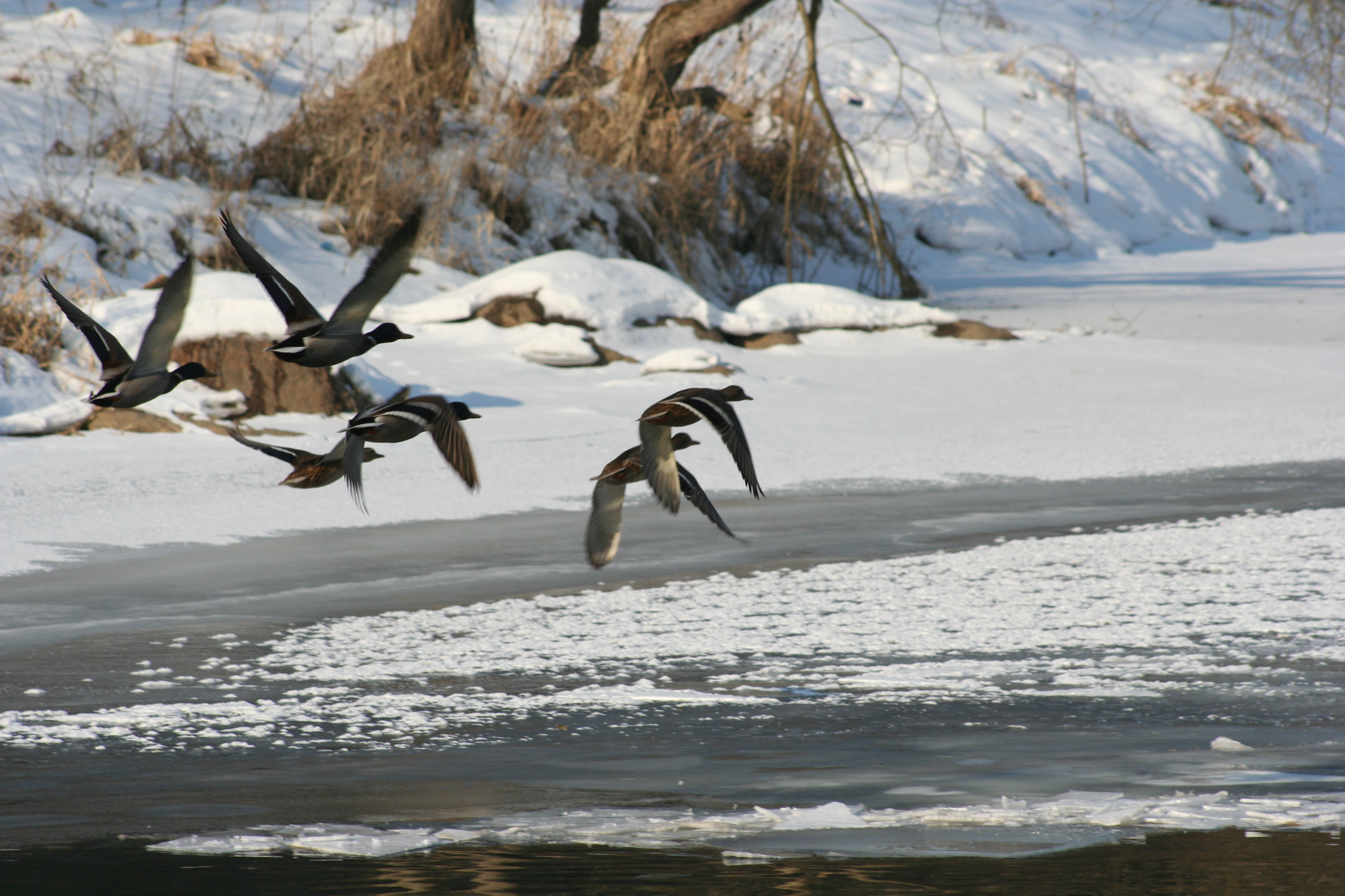 Anas platyrhynchos